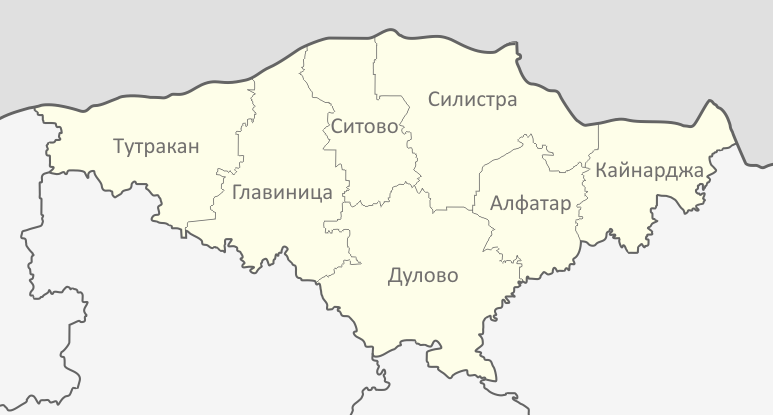 Картата е създадена от Любомир Таушанов